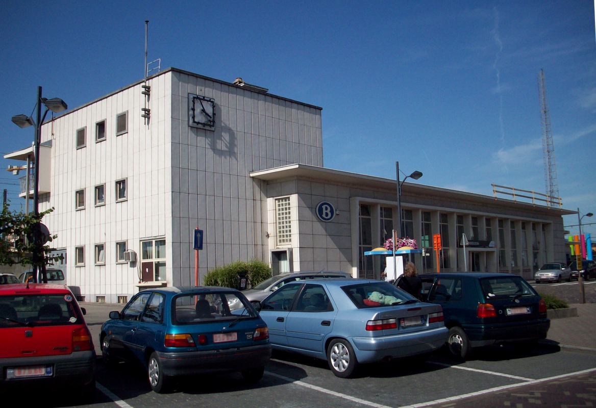 Station Denderleeuw